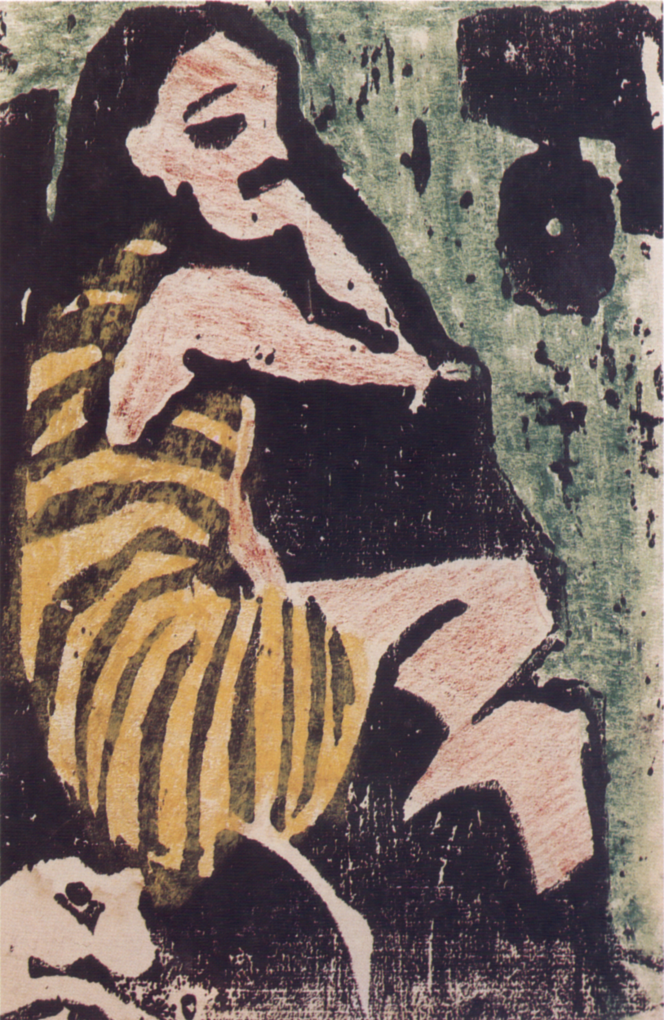 Artistin Marcella